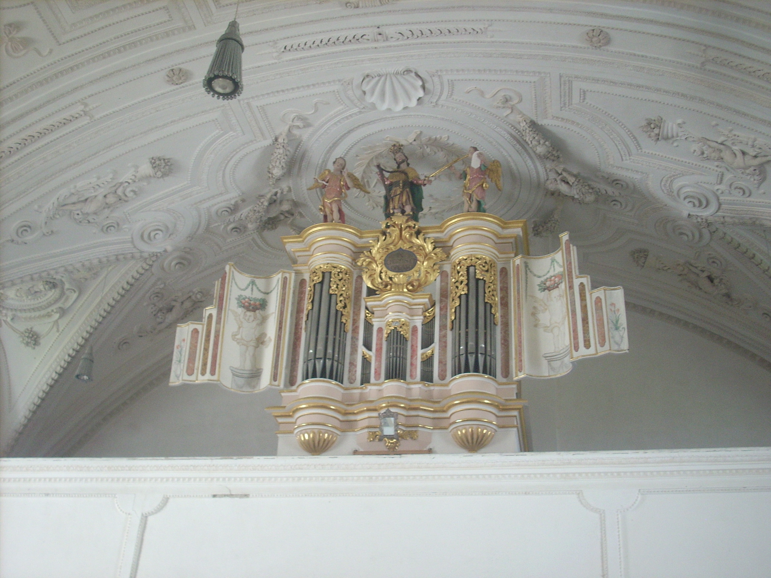 Steingaden-Ilgen, Wallfahrtskirche, Orgel